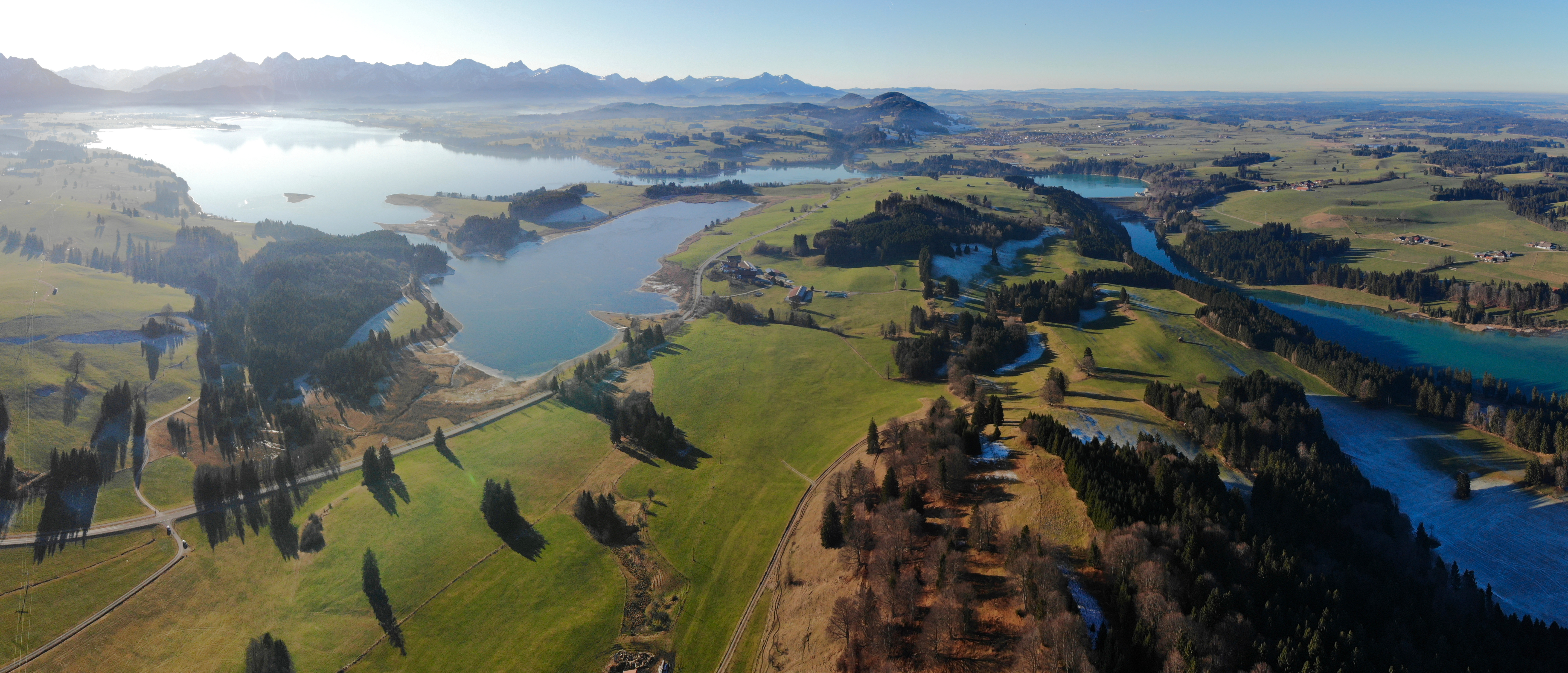 Illasbergsee Luftaufnahme